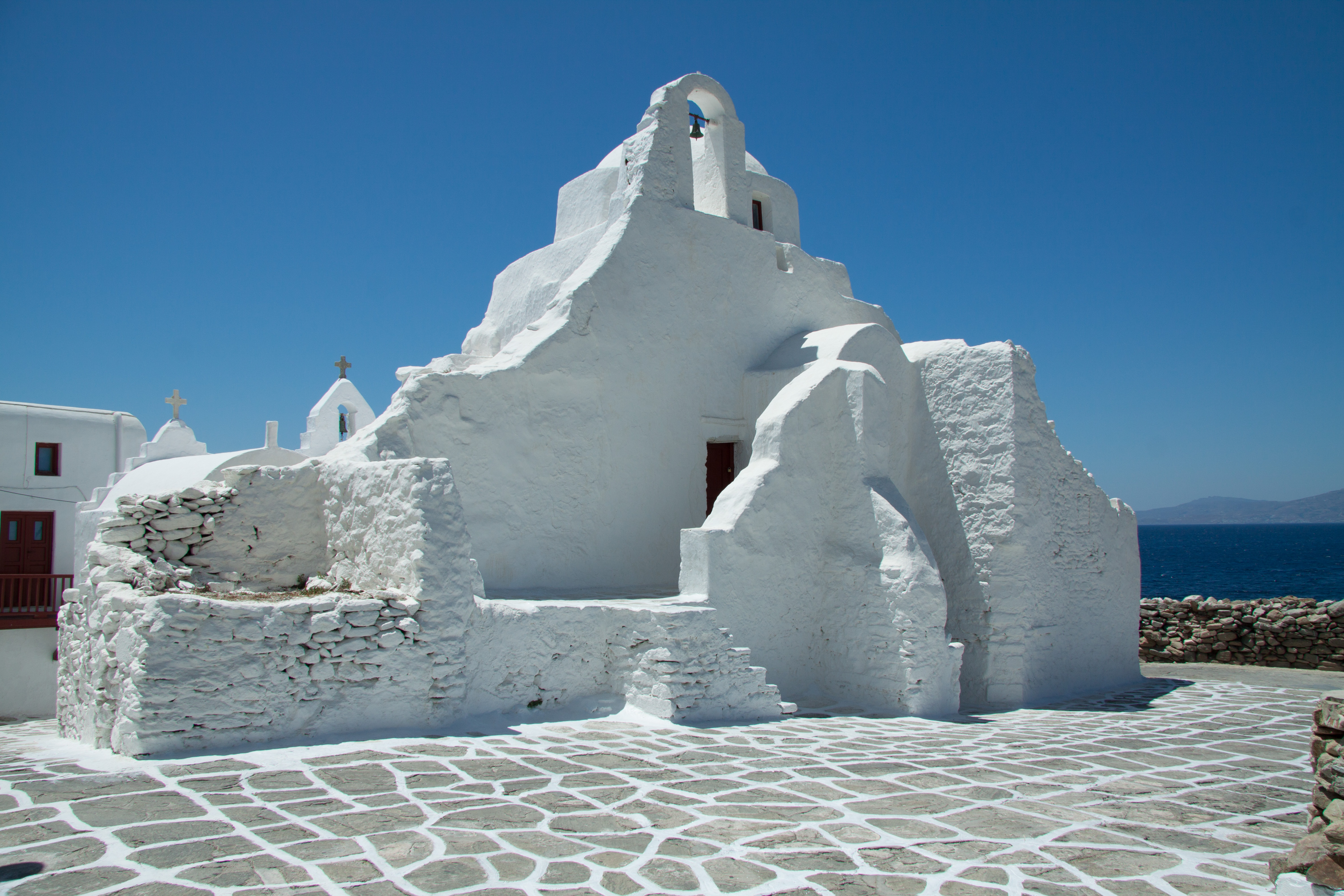 «Παραπορτιανή»